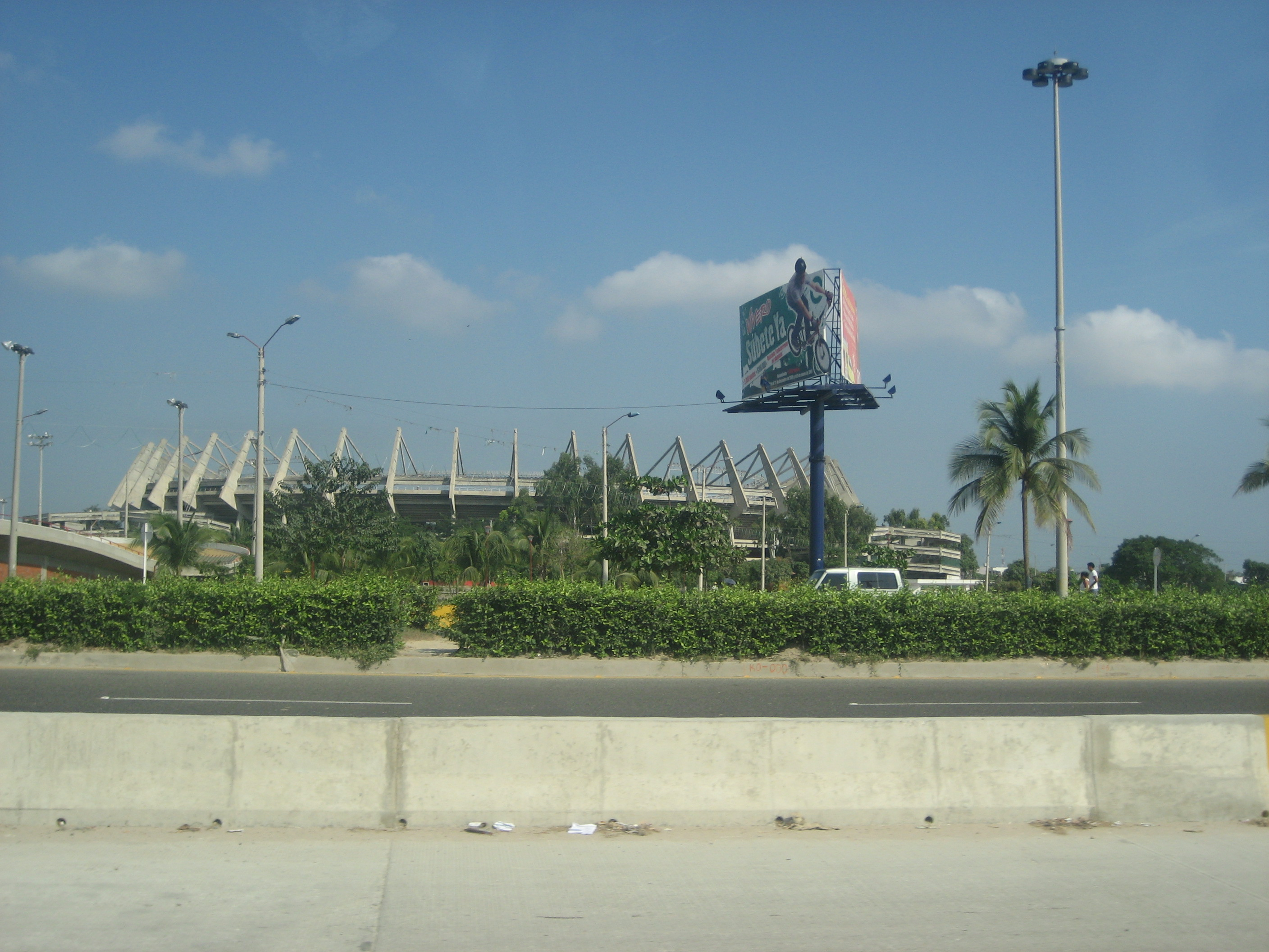 Image of Metropolitan Stadium Barranquilla, Colombia